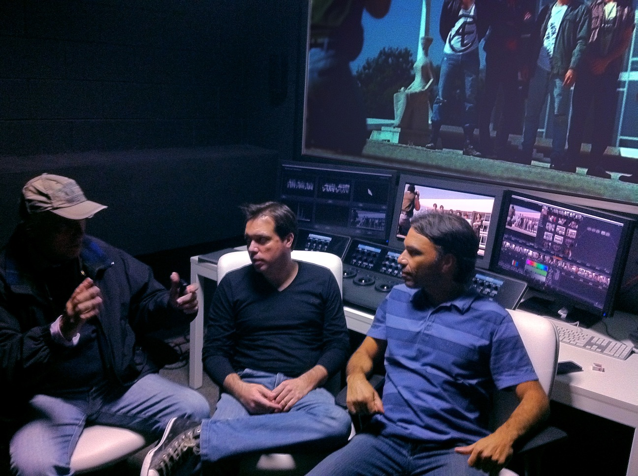 Pequena reunião com Fontoura, Marco e Dirceu, para corrigir as cores do filme na Quanta Post.